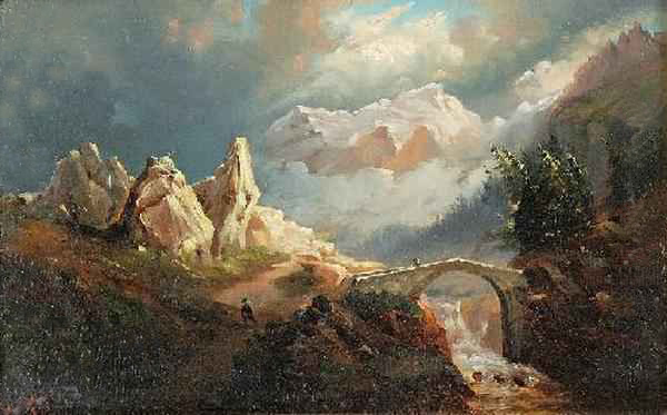 Pejzaż górskilabel QS:Lpl,"Pejzaż górski"